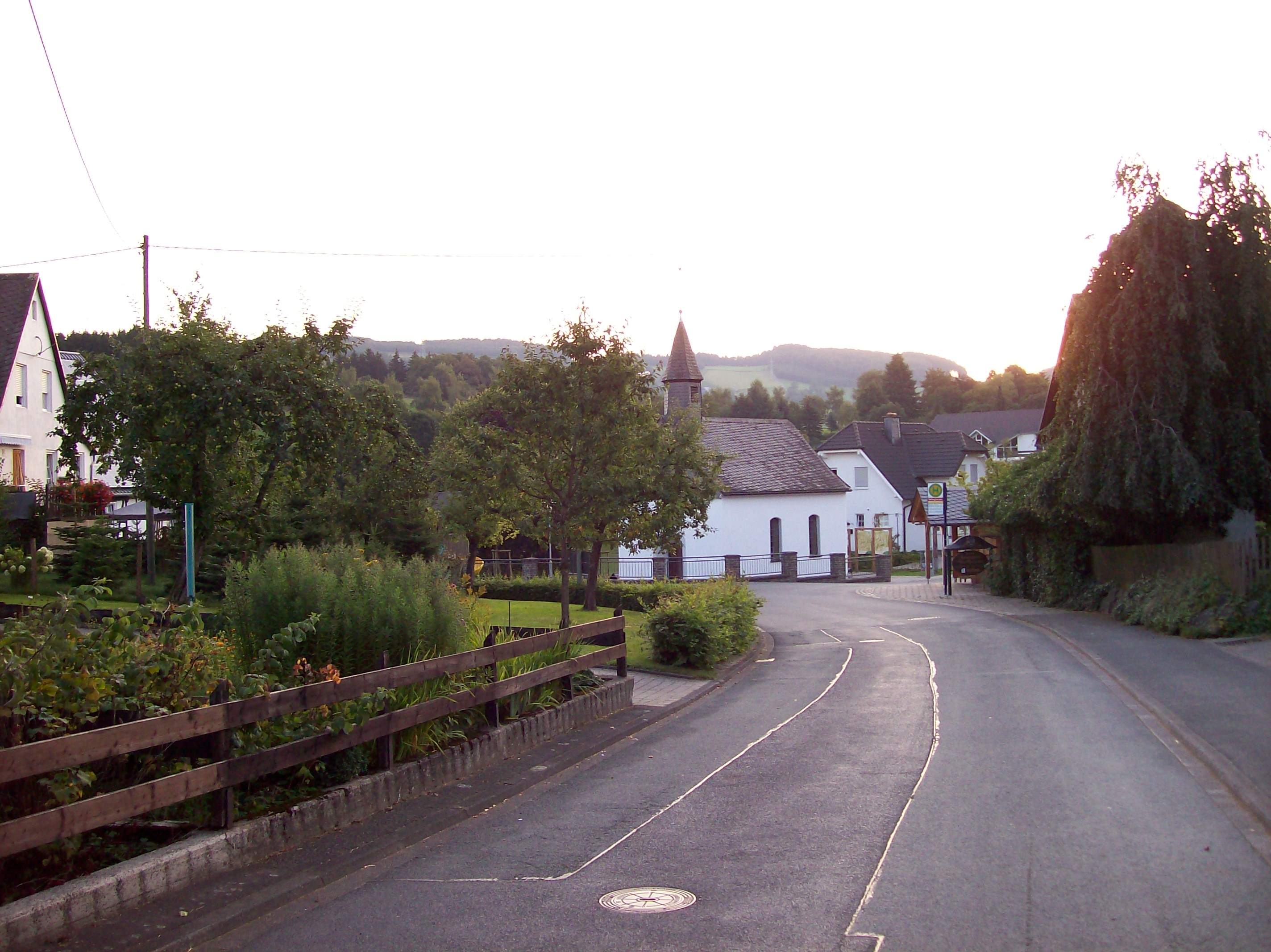 Sellinghausen (Schmallenberg), Germany.